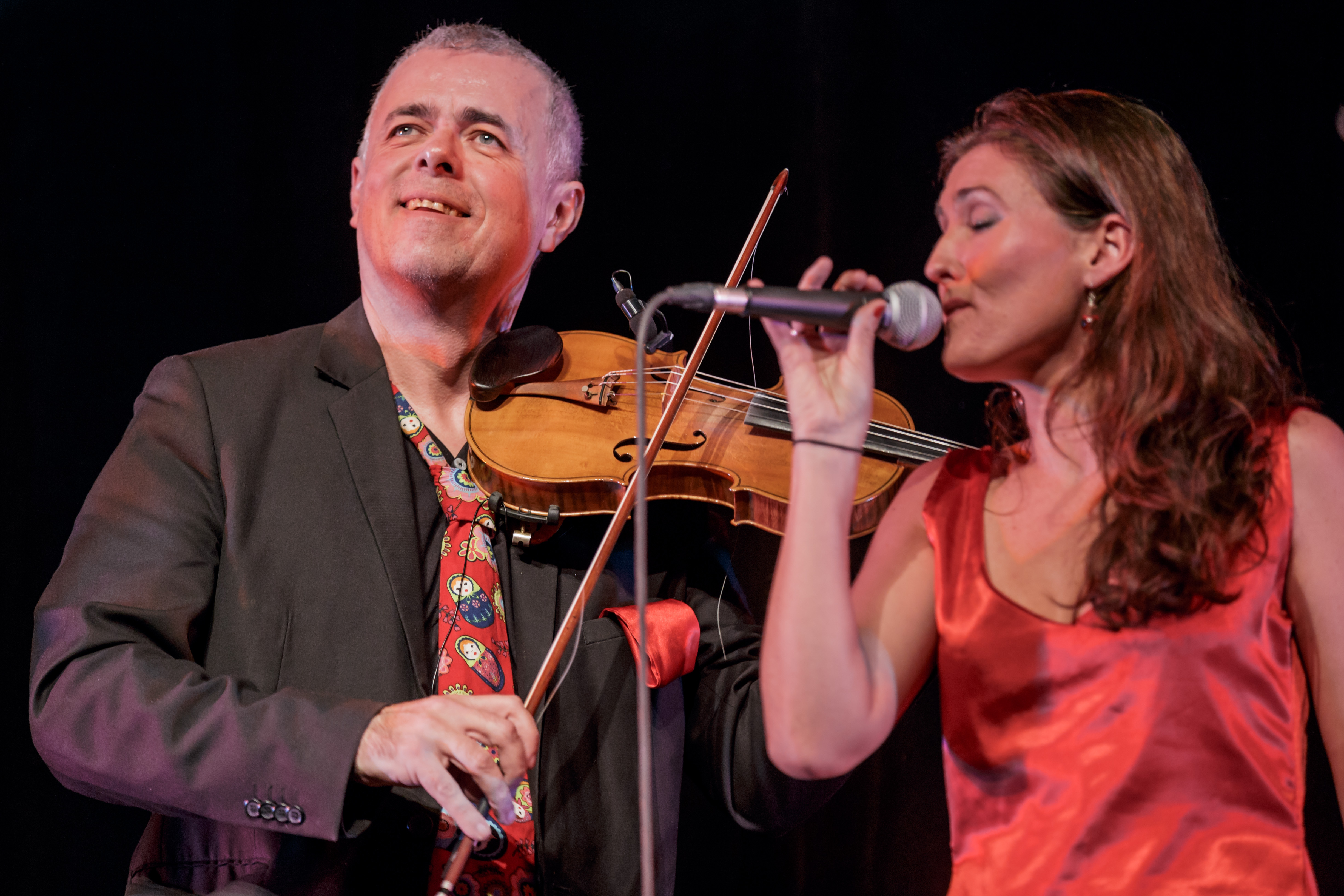 Morwenn Le Normand et Ronan Pinc en fest-noz lors du festival Yaouank le 19 novembre 2016 au MusikHall du Parc Expo de Rennes.